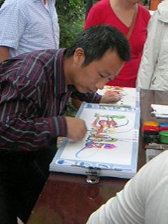 Künstler im Eling Park, Chongqing